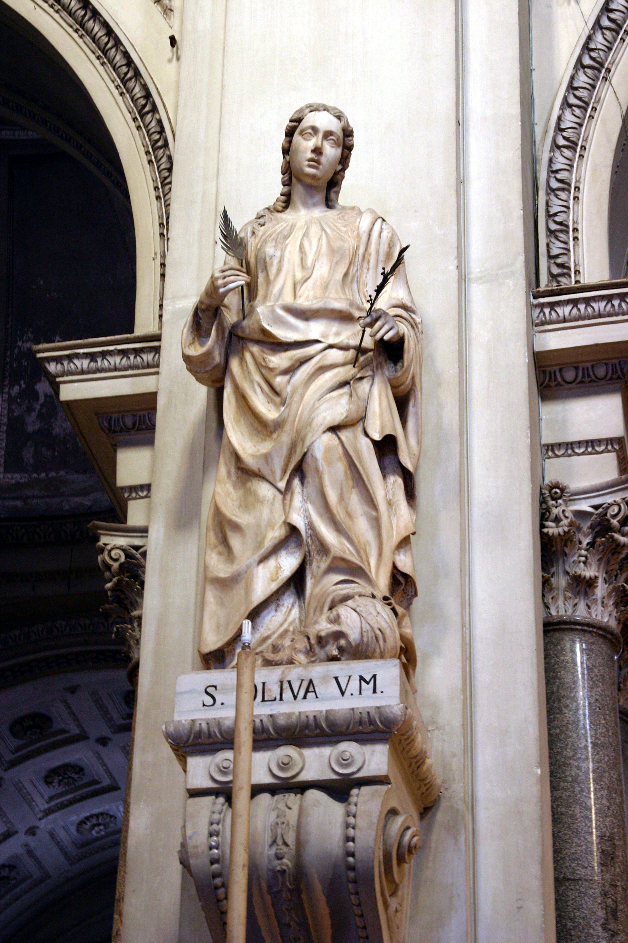 Cathedral of Palermo